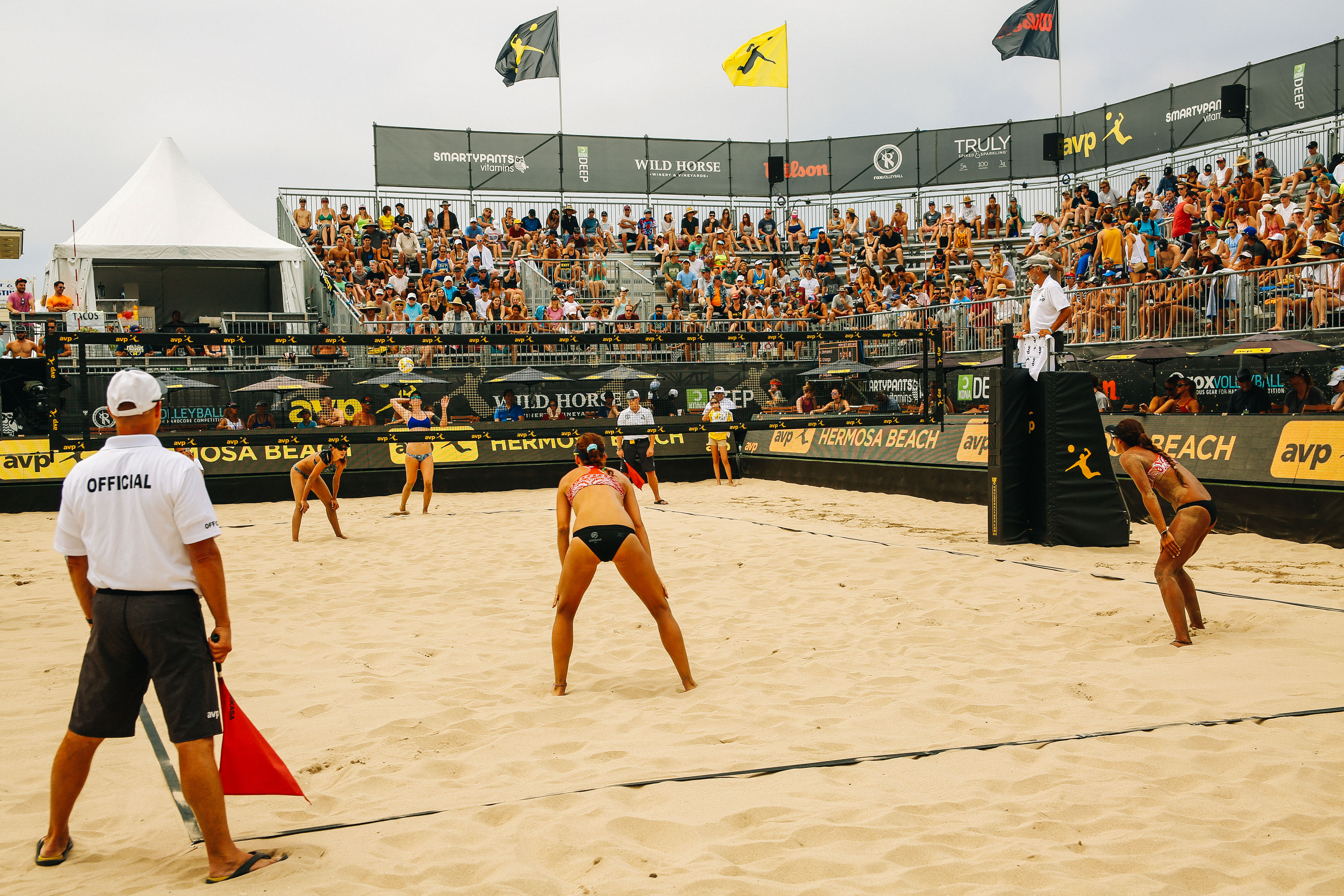 AVP Hermosa Beach Open 2017